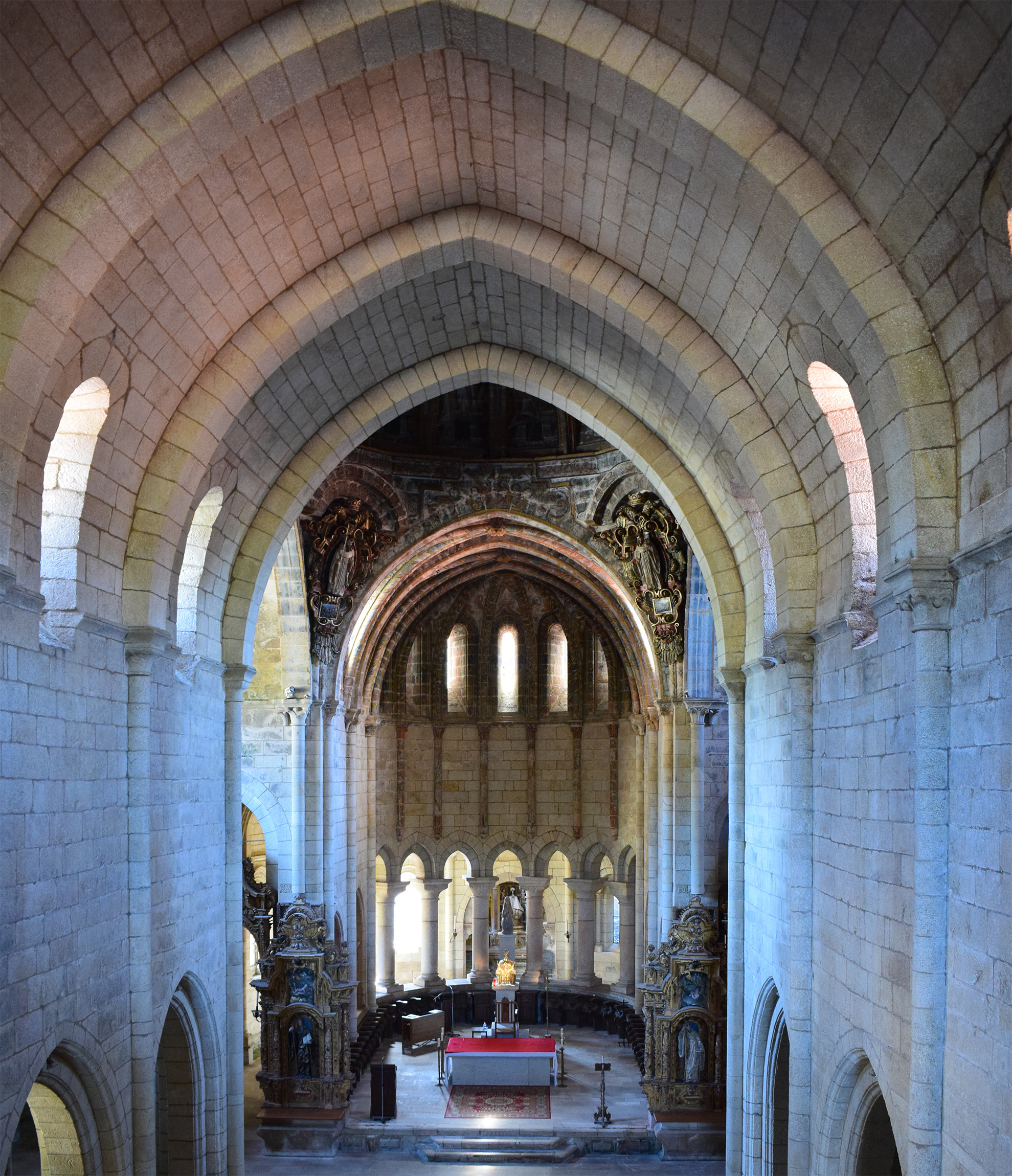 Altar Maior e nave principal da Igrexa abacial do Mosteiro de Oseira